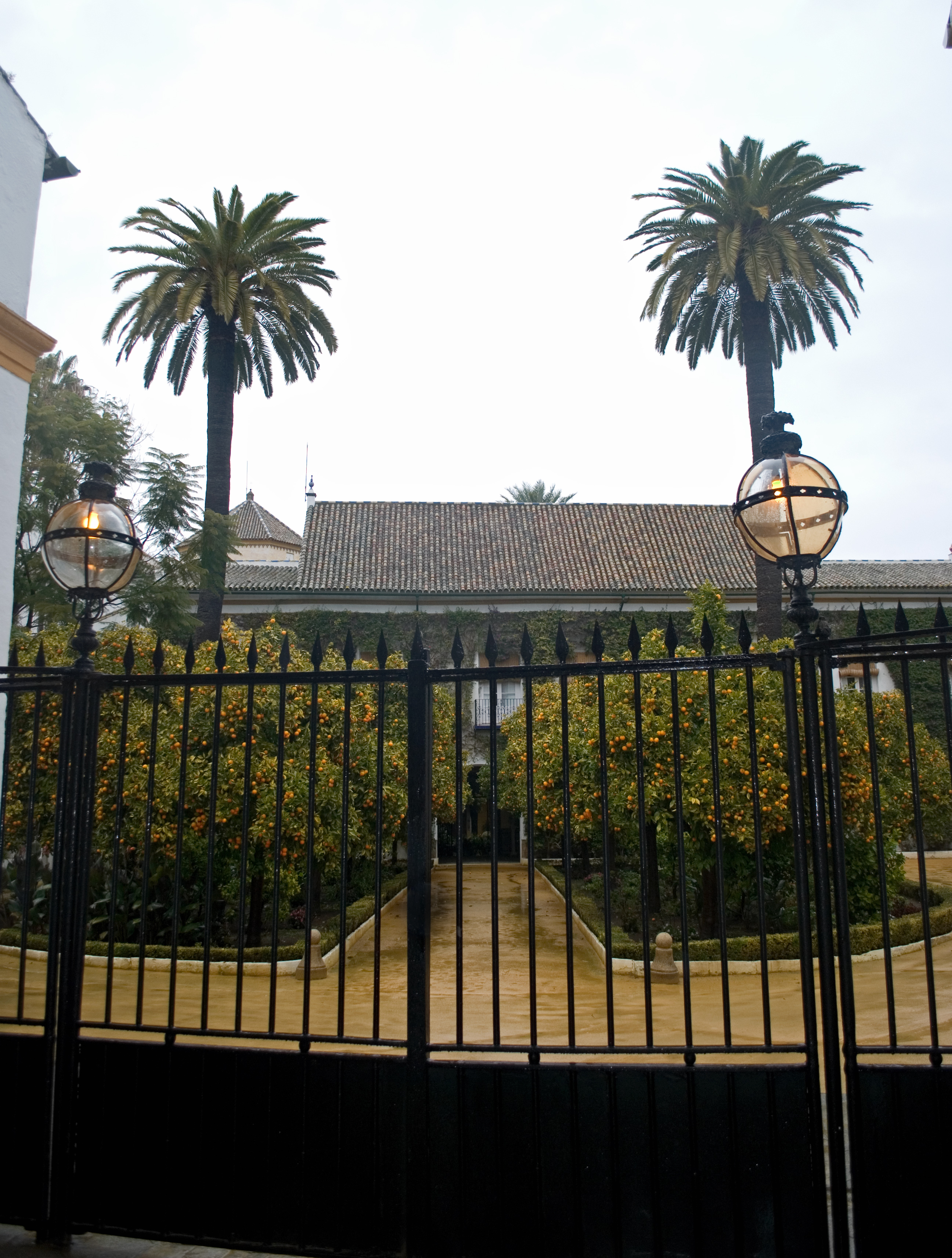 Acceso al Palacio de las Dueñas, Sevilla